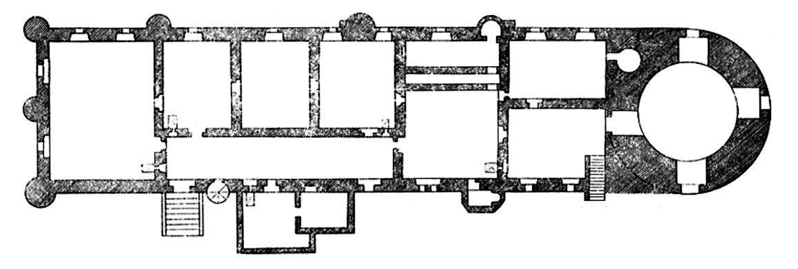 Plán zámku překreslený podle nákresu z roku 1590 uloženého v třeboňském archivu